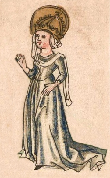 Königin Hildegard, dritte Frau Kaiser Karls des Großen